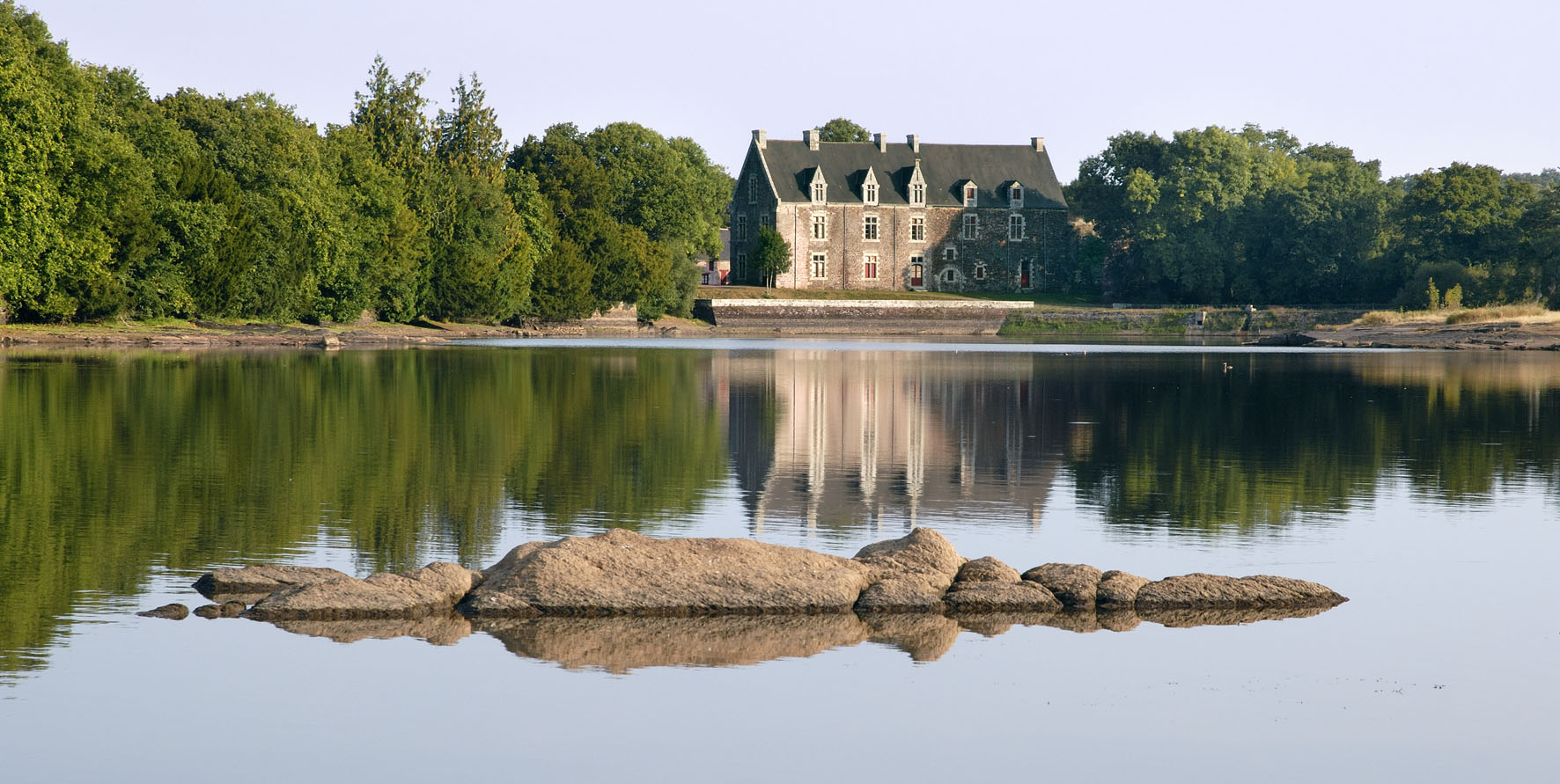 Château de Comper au bord de l'étang de Viviane.